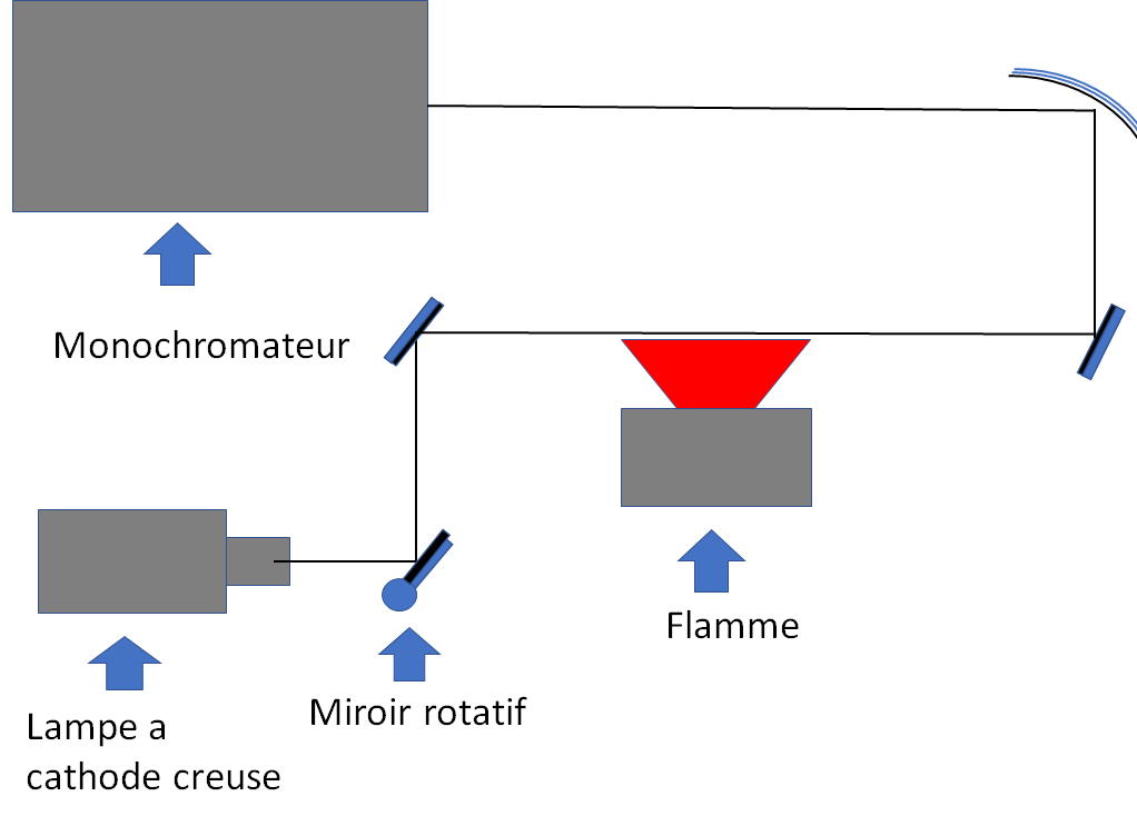 Schéma du trajet optique d'un spectromètre à flamme. On retrouve la lampe à cathode creuse, ainsi que son rayonement, la flamme et finalement le monochromateur.